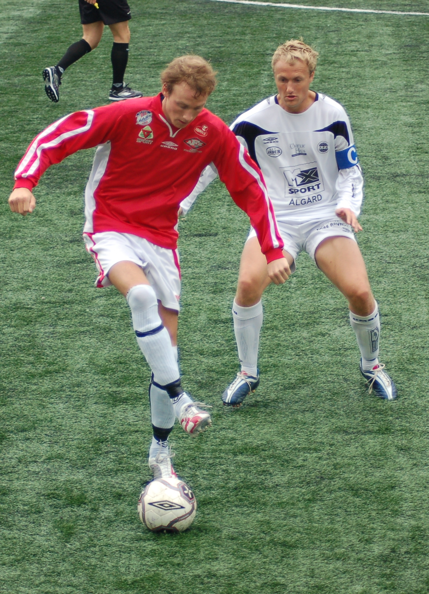 Askøy FK–player and Oddbjørn Sivertsen, Ålgård Fotballklubb